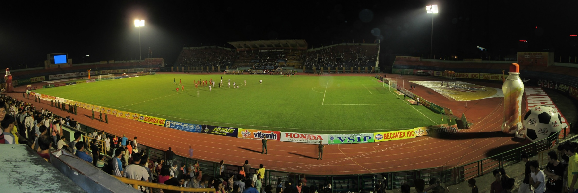 Toàn cảnh Sân vận động Gò Đậu, Bình Dương. Trận đấu giữa U23 Việt Nam và Bangu Atlestico Clube